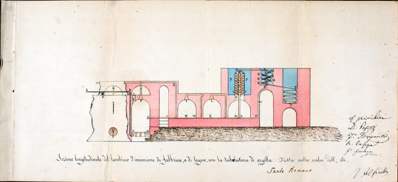 Sezione longitudinale dell'alambicco di legno con tubazioni in argilla, per distillare a vapore l'alcol delle vinacce; scala 1:200, 1857 (AS Napoli, Ministero di agricoltura, industria e commercio, 284/6)